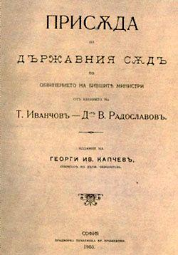 Присъда на Държавния съд